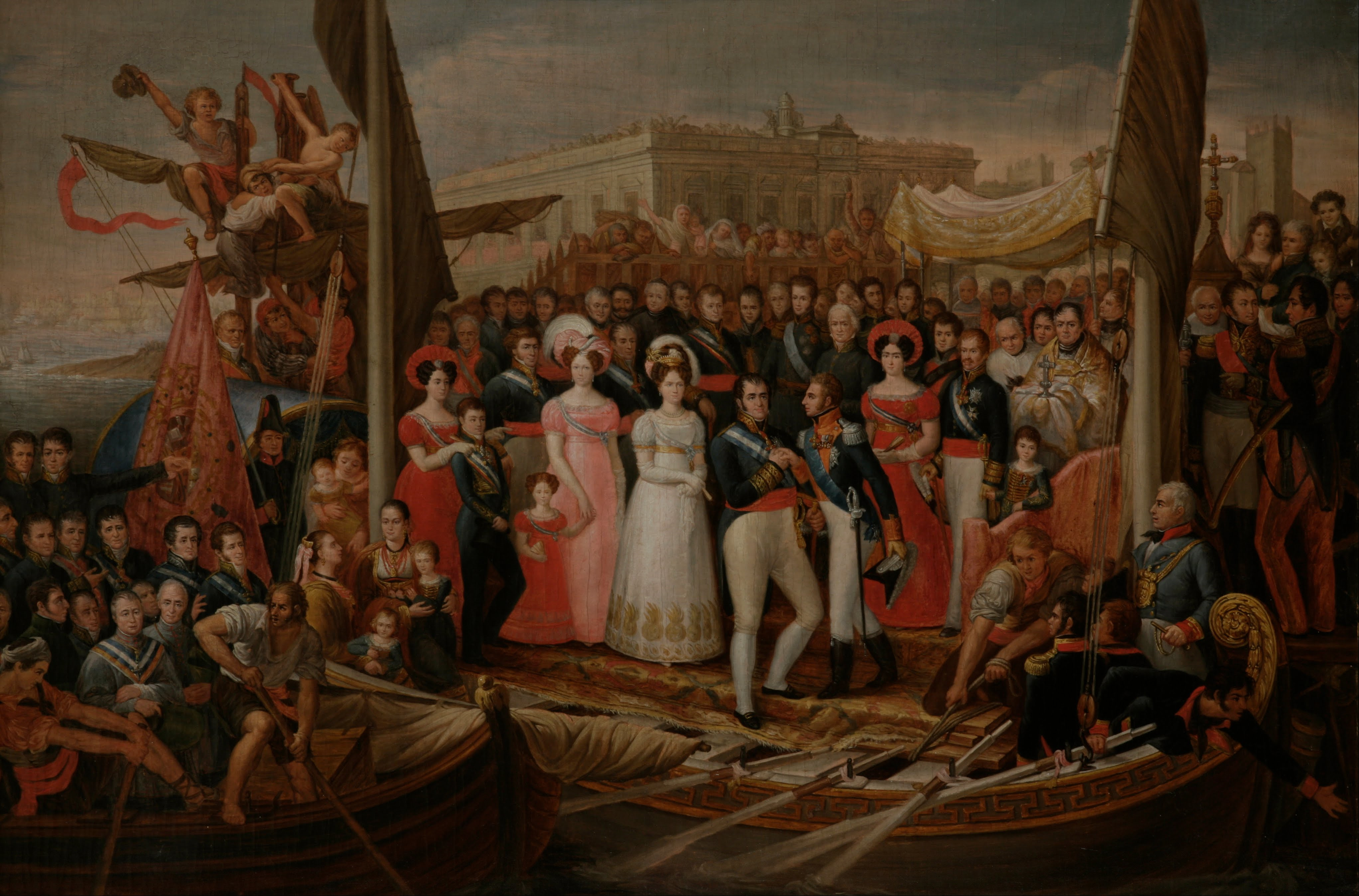 El lienozo representa el desembarco del rey Fernando VII de España (1784-1833), en el municipio de Puerto de Santa María, situado en la provincia de Cádiz, (España).